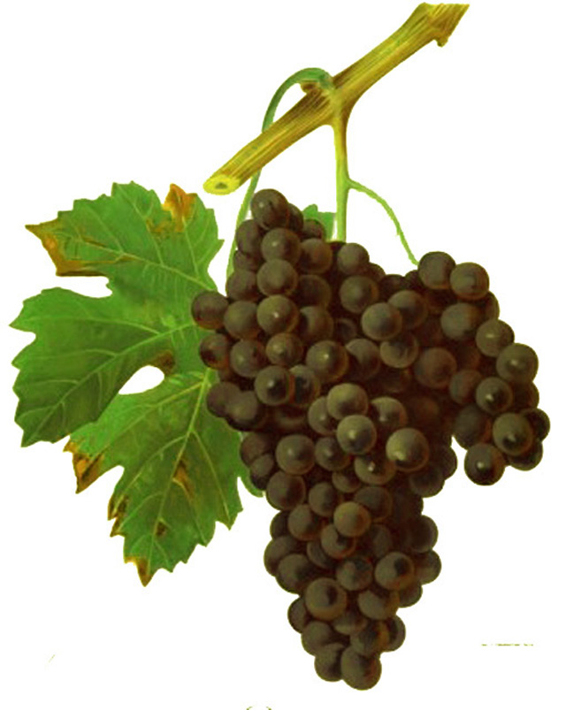 Grappe de Duras par Viala et Vermorel